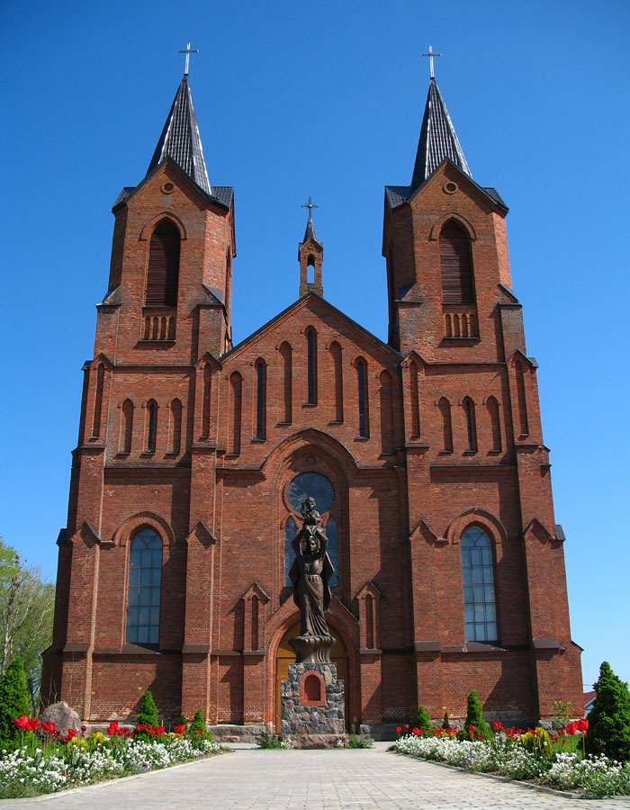 Беларуская (тарашкевіца): Касьцёл Унебаўзяцьця Найсьв. Панны Марыі ў Мёрах